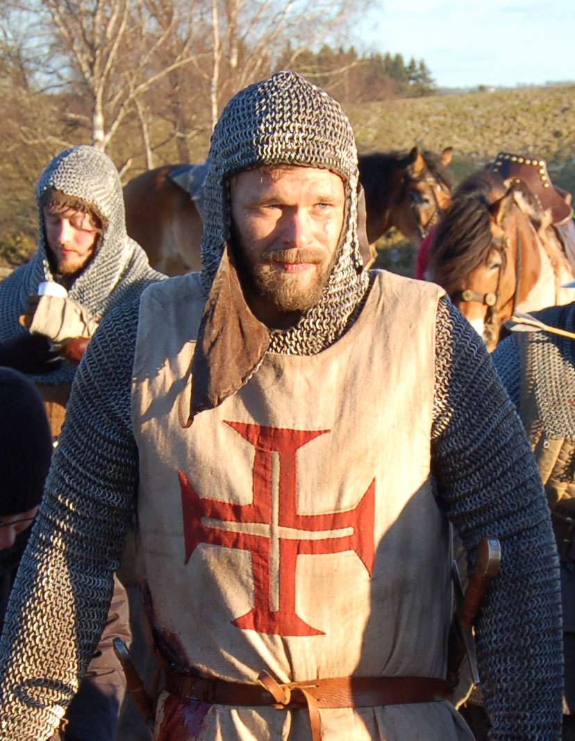 Joakim Nätterqvist i filmen Arn